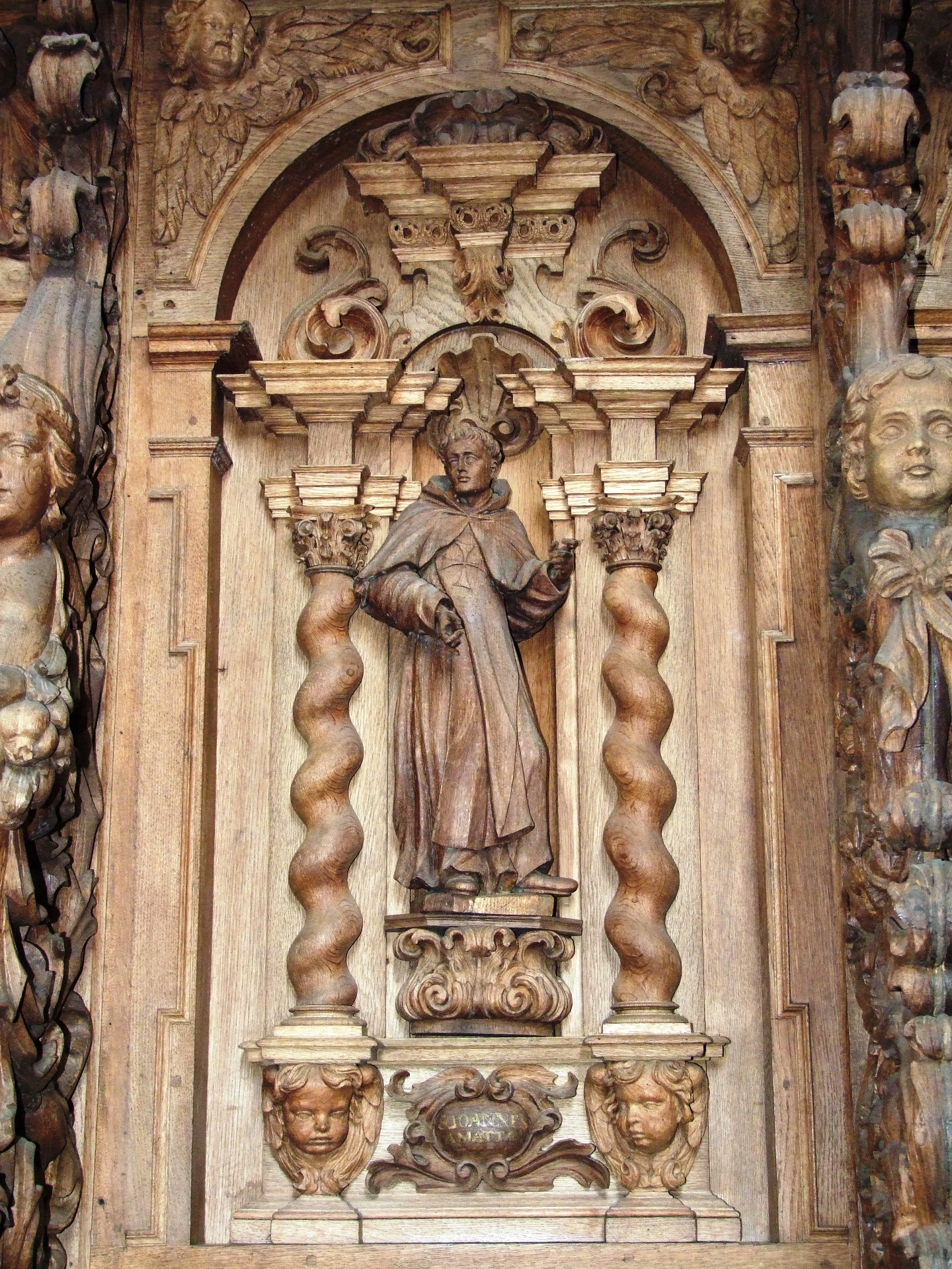 Das Chorgestühl in der Klosterkirche des ehemaligen Kartäuserklosters Buxheim: Johannes von Matha